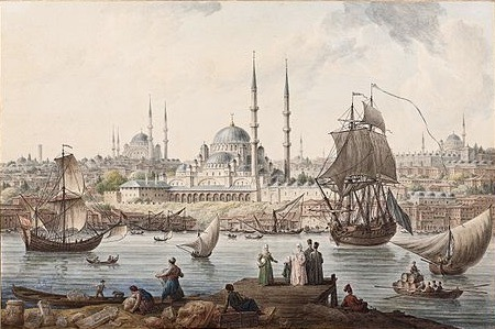 Jean-Baptiste Hilaire (1753–1822): Yeni Camii und Hafen von Istanbul. Aquarell auf Papier, 405 x 575 mm. Pera-Museum, Istanbul.